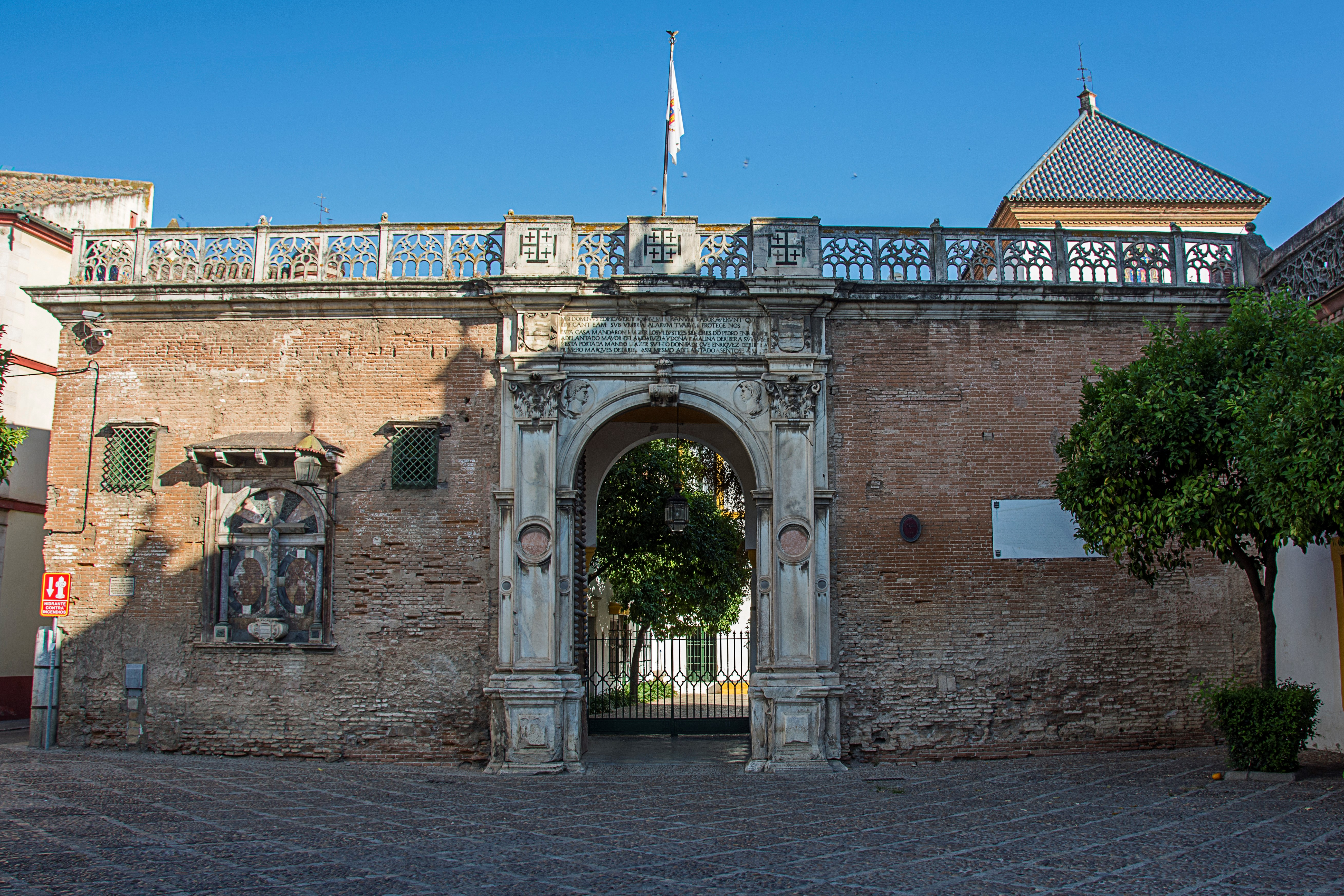 Entrada principal, de estilo renacentista de la Casa de Pilatos de Sevilla, realizada por el artista italiano Antonio Aprile, en 1529.